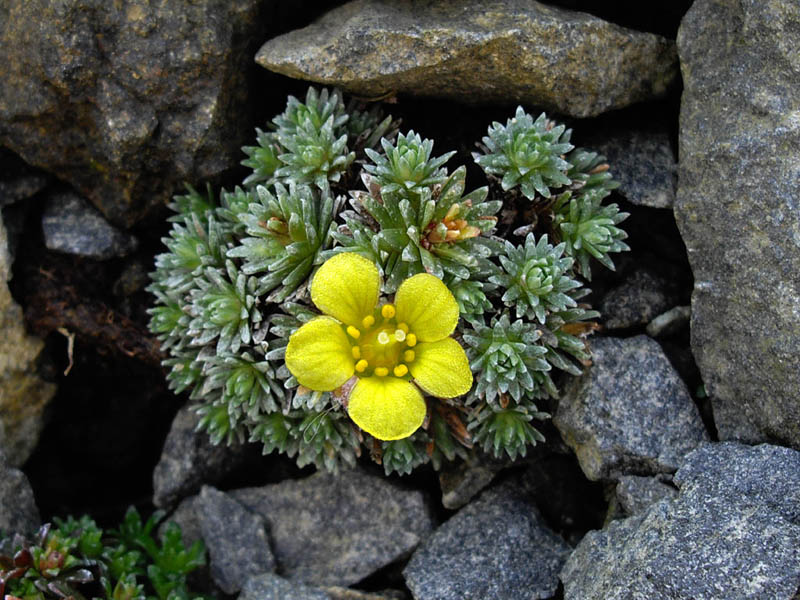 Saxifraga x geuderi 'Eulenspiegel'